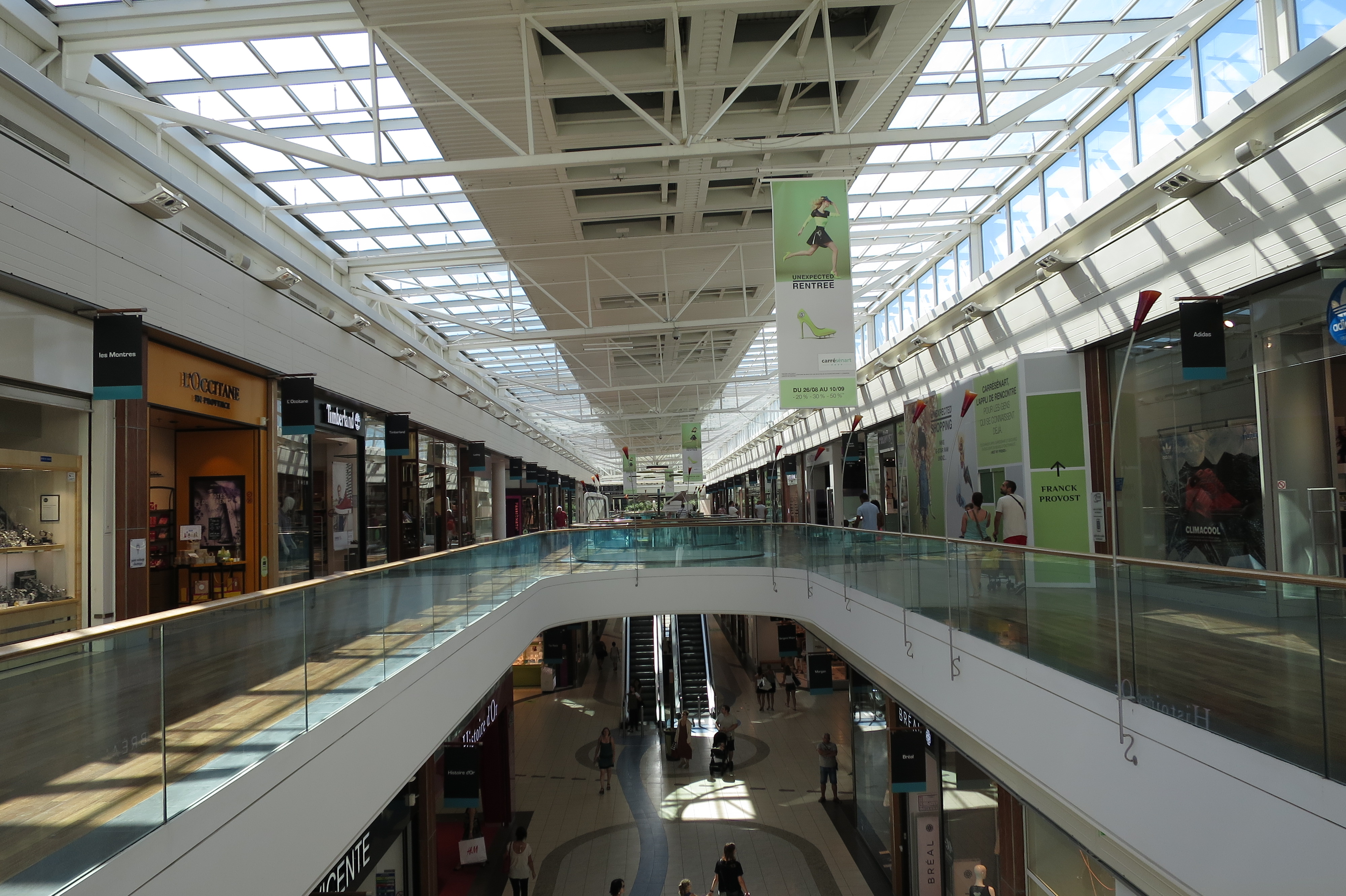 Gallerie du centre commercial Carré-Sénart (Lieusaint - Seine-et-Marne - France)